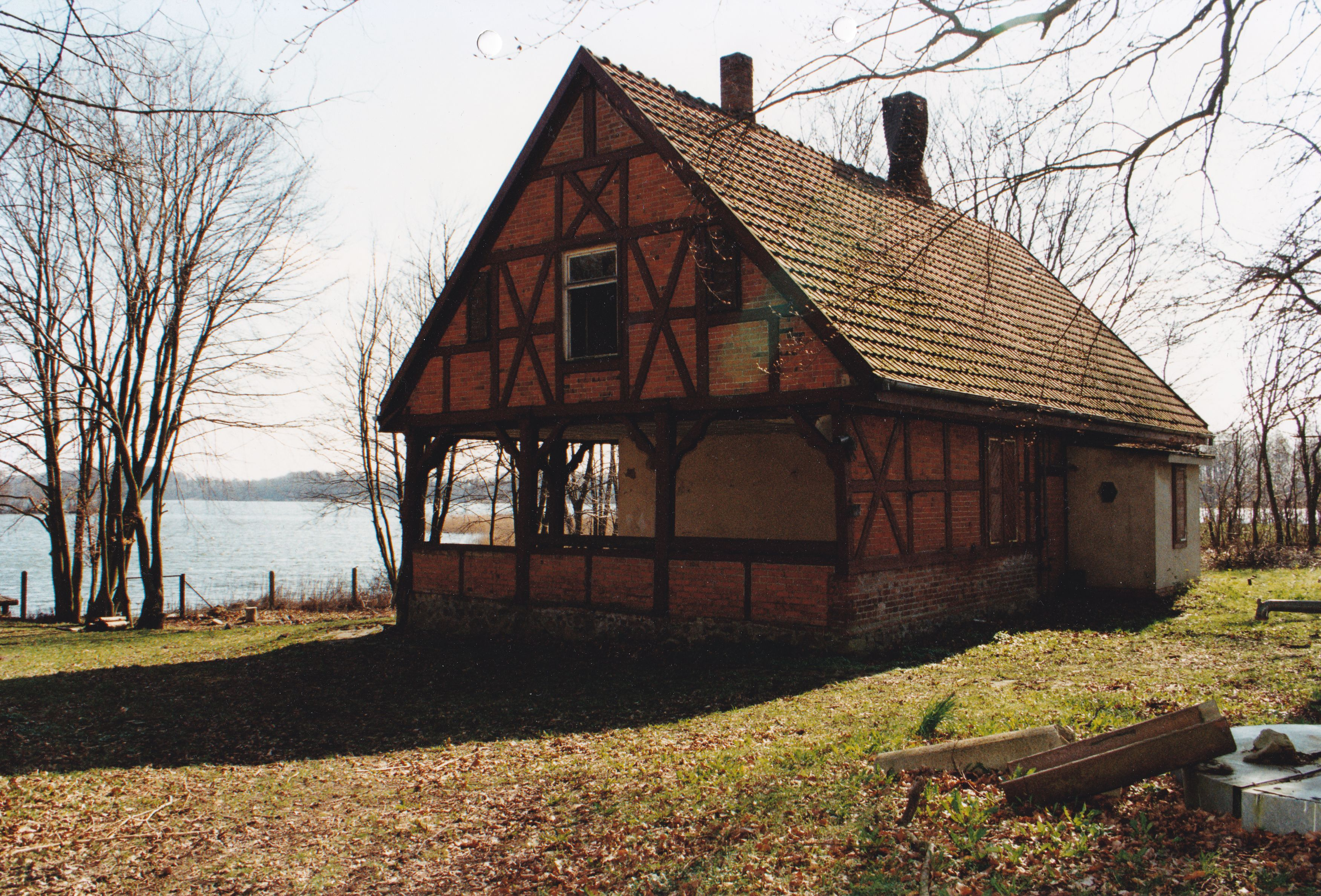 Rückseite vom Gartenhäuschen der Dobbertiner Klosterdamen auf der Halbinsel Buchholz im Dobbertiner See.